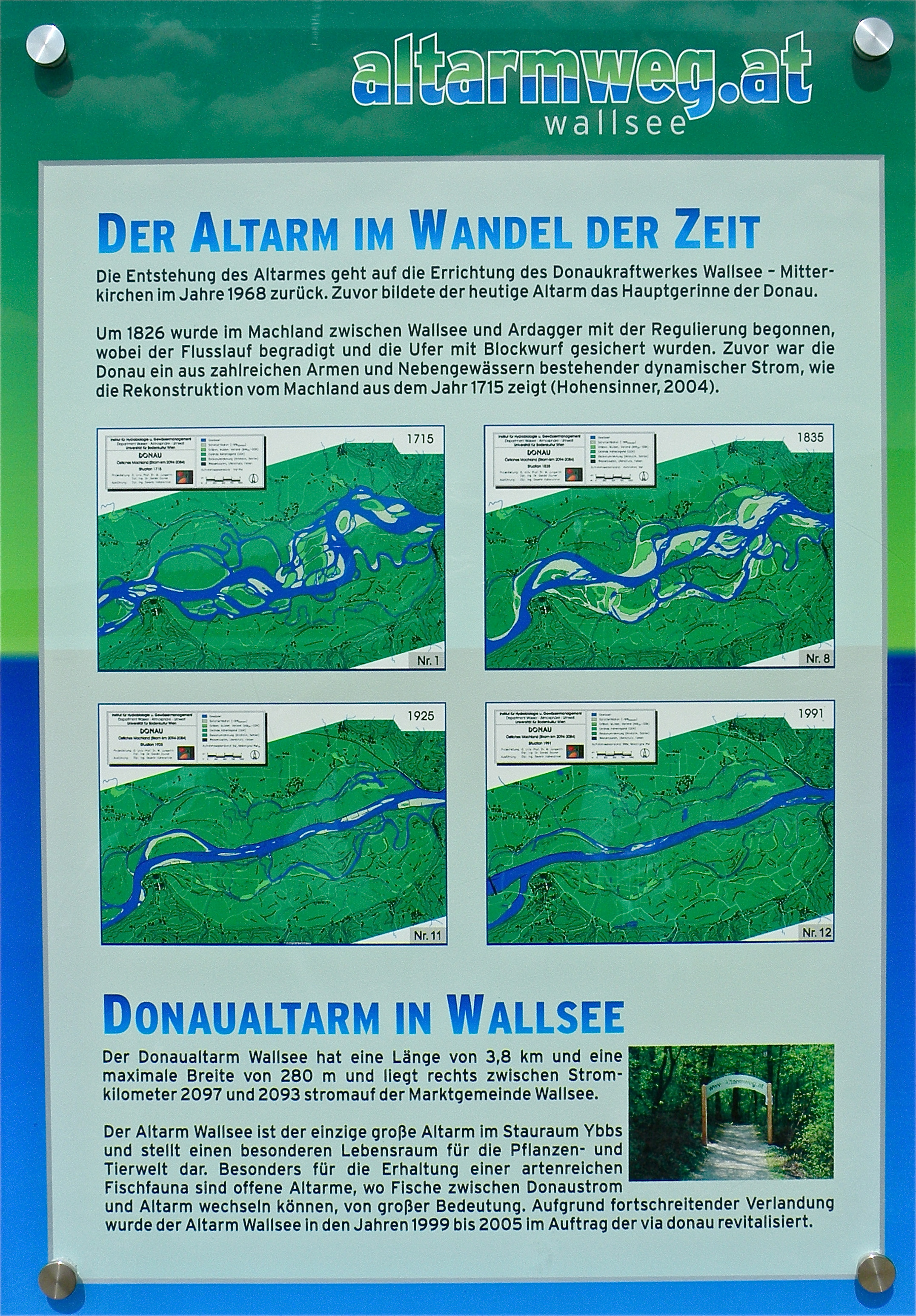 Informationstafel für den Altarm-Weg in der Marktgemeinde Wallsee-Wieselburg, aufgestellt auf einem öffentlichen Ort